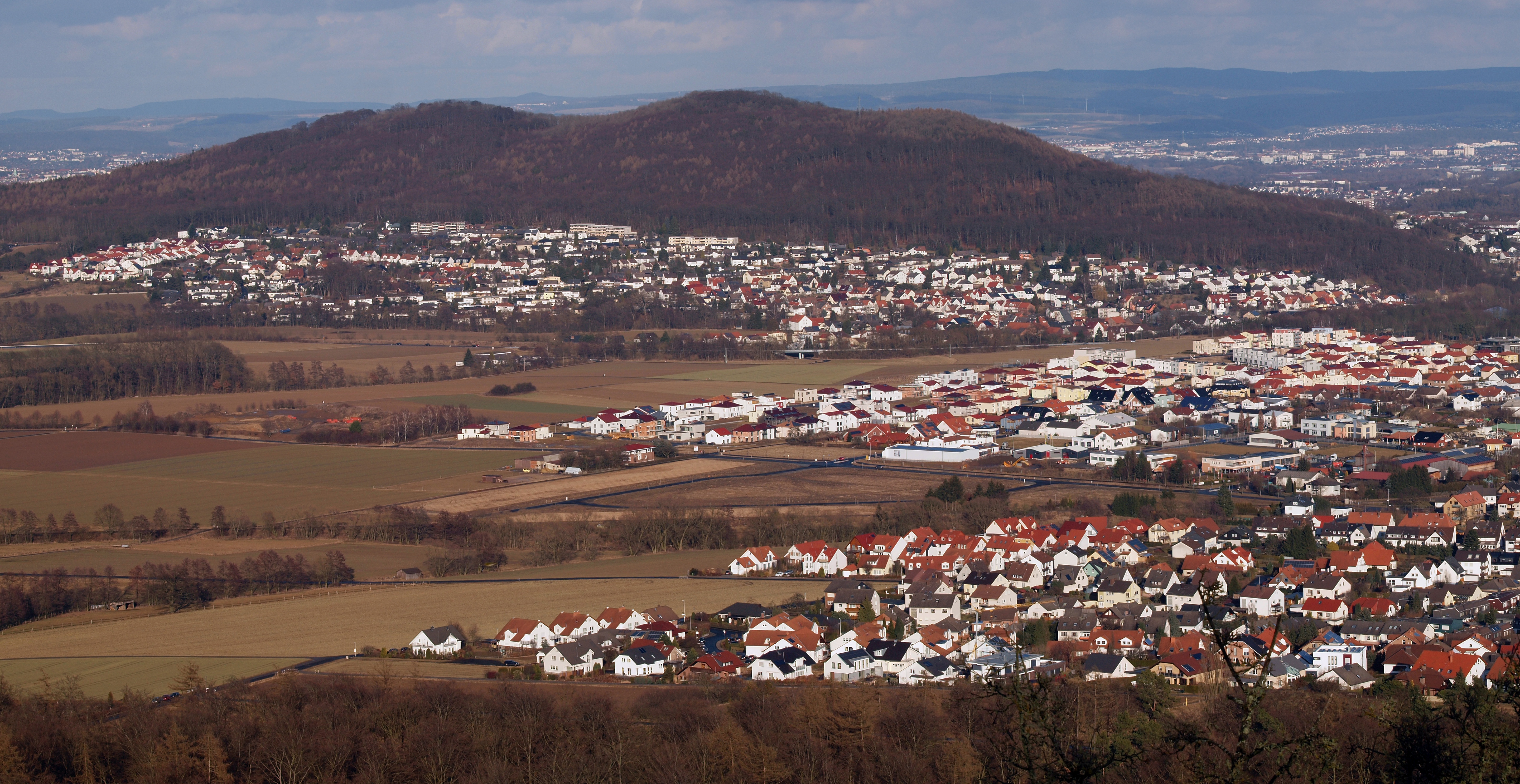 Baunsberg